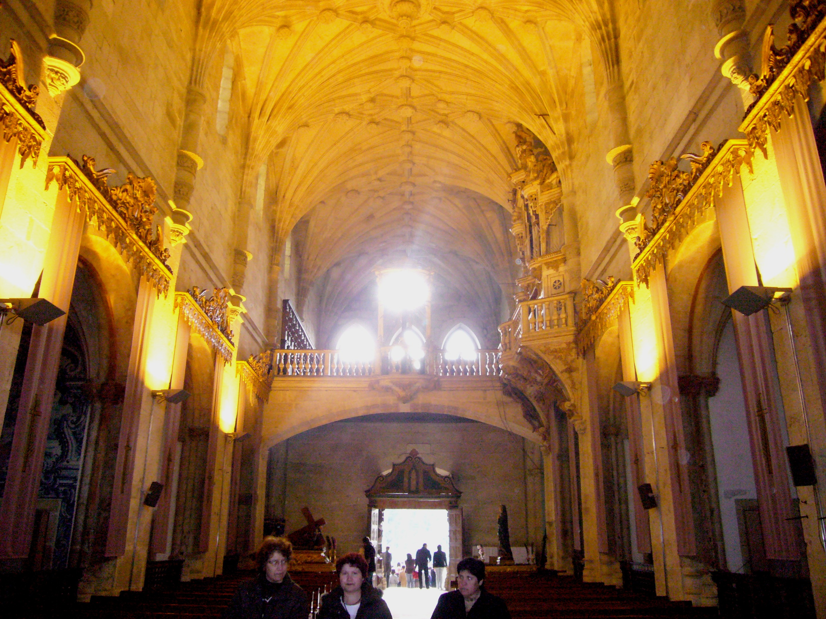 Coro da Igreja de Vilar de Frades